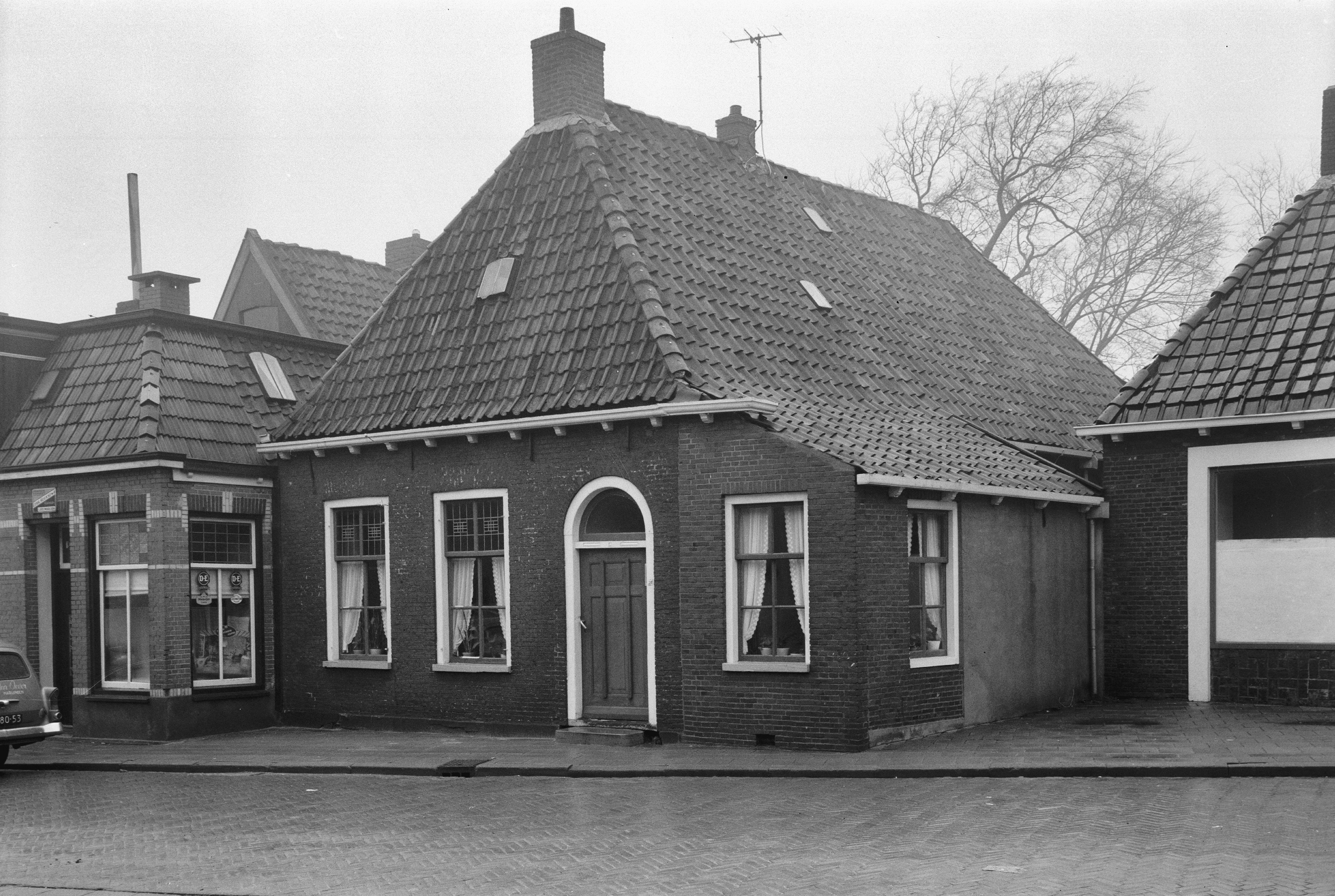 Doopsgezinde Kerk: voorzijde